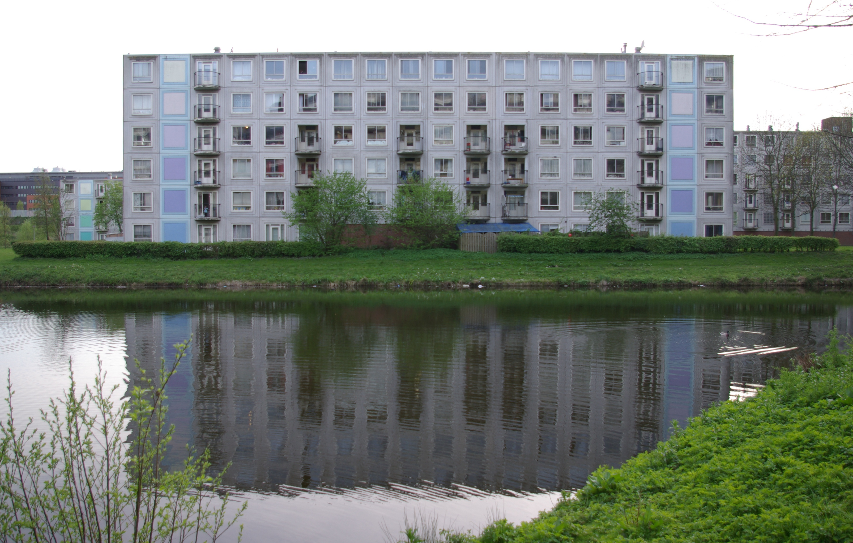 Amsterdam Zuidoost, Flat Heesterveld